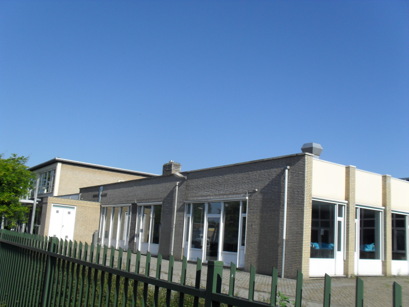 VMBO-school Herle College gehuisvest in Heerlen.